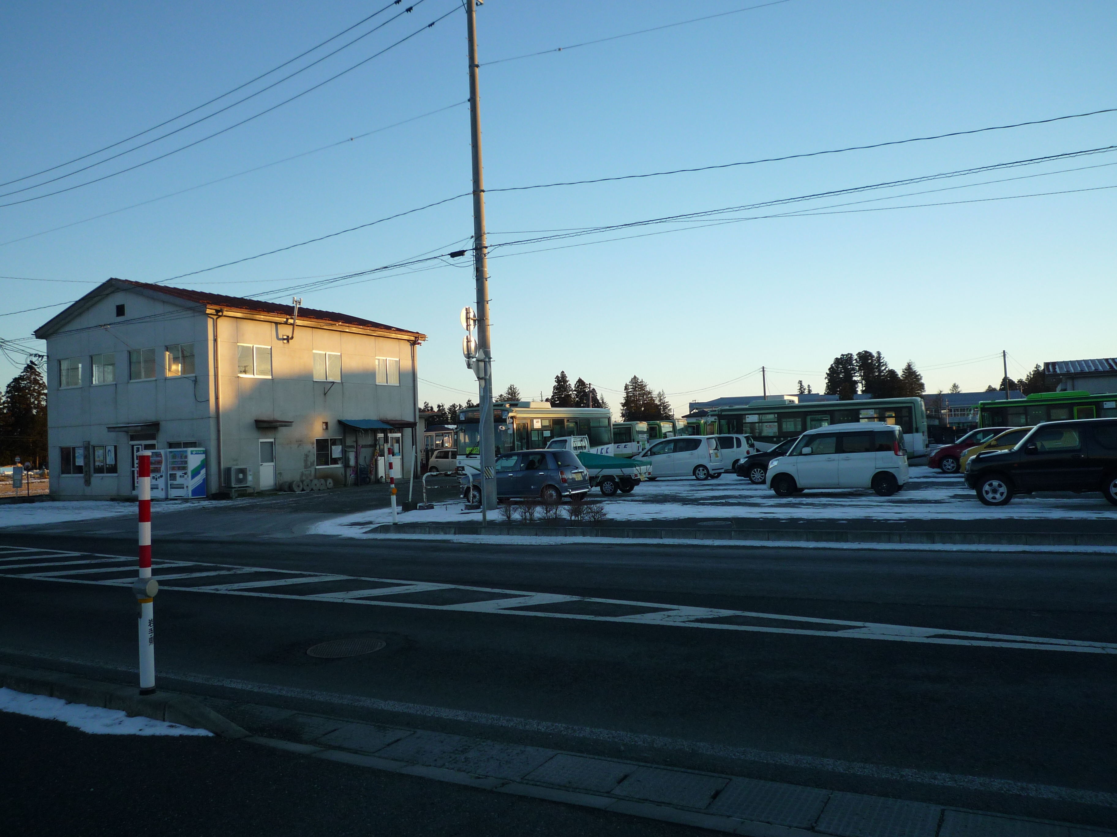 紫波営業所。向かい側から撮影。